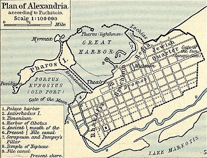 Die Ausdehnung des Römischen Reiches